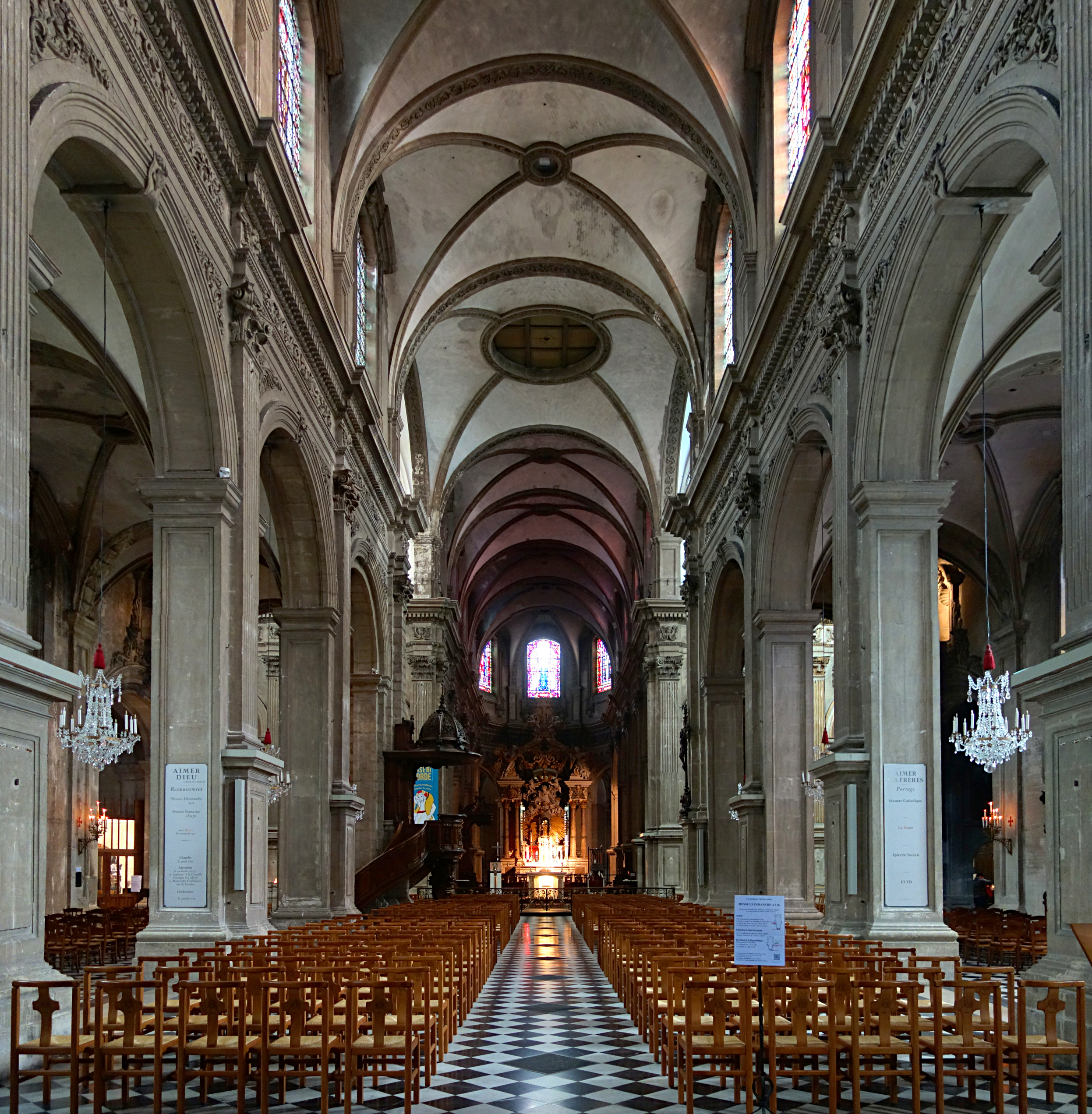 La nef de la cathédrale.